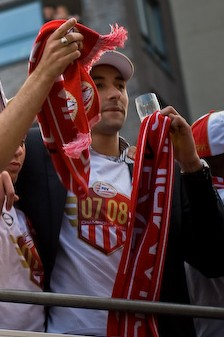 Heurelho Gomes